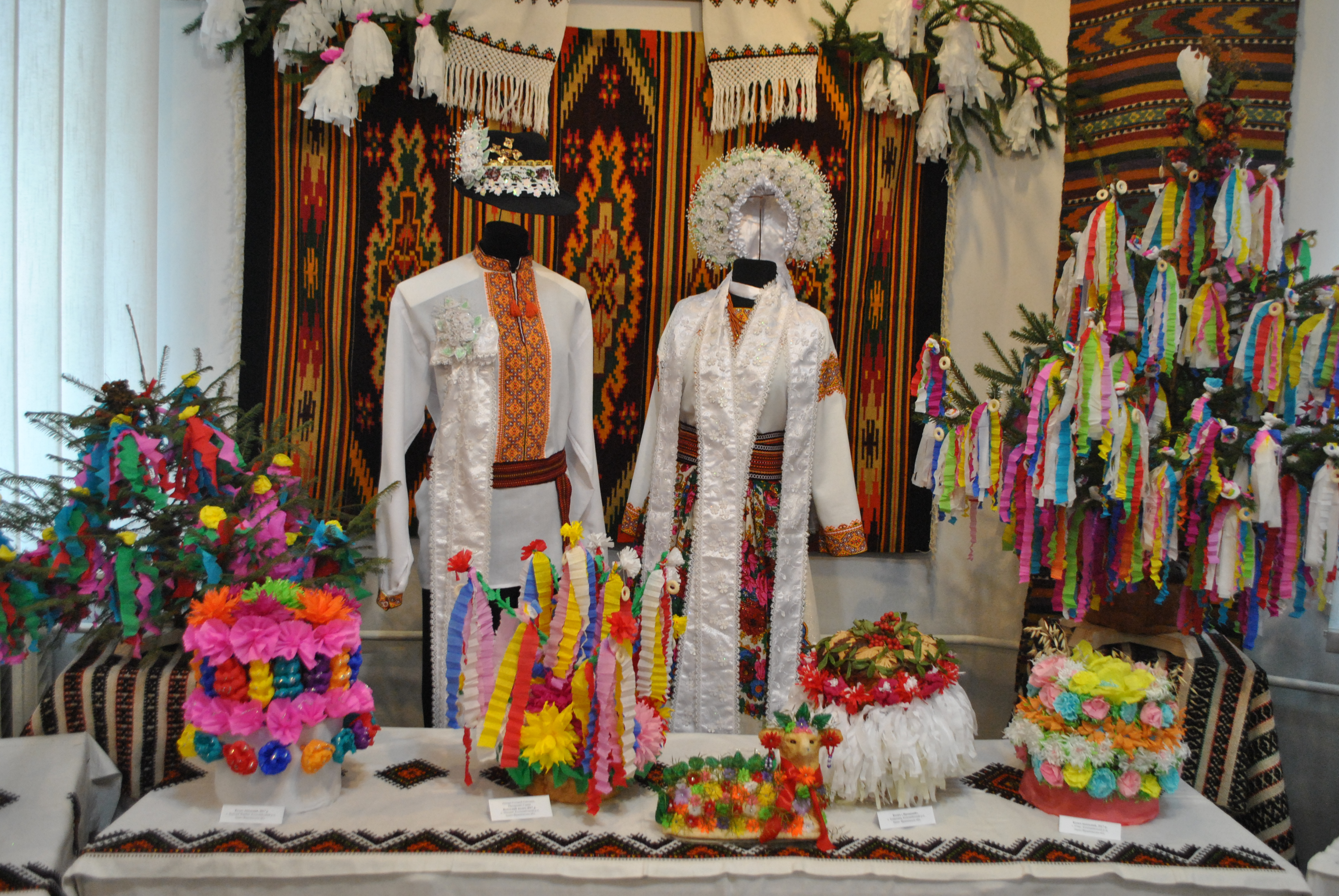 Гуцульський весільний одяг